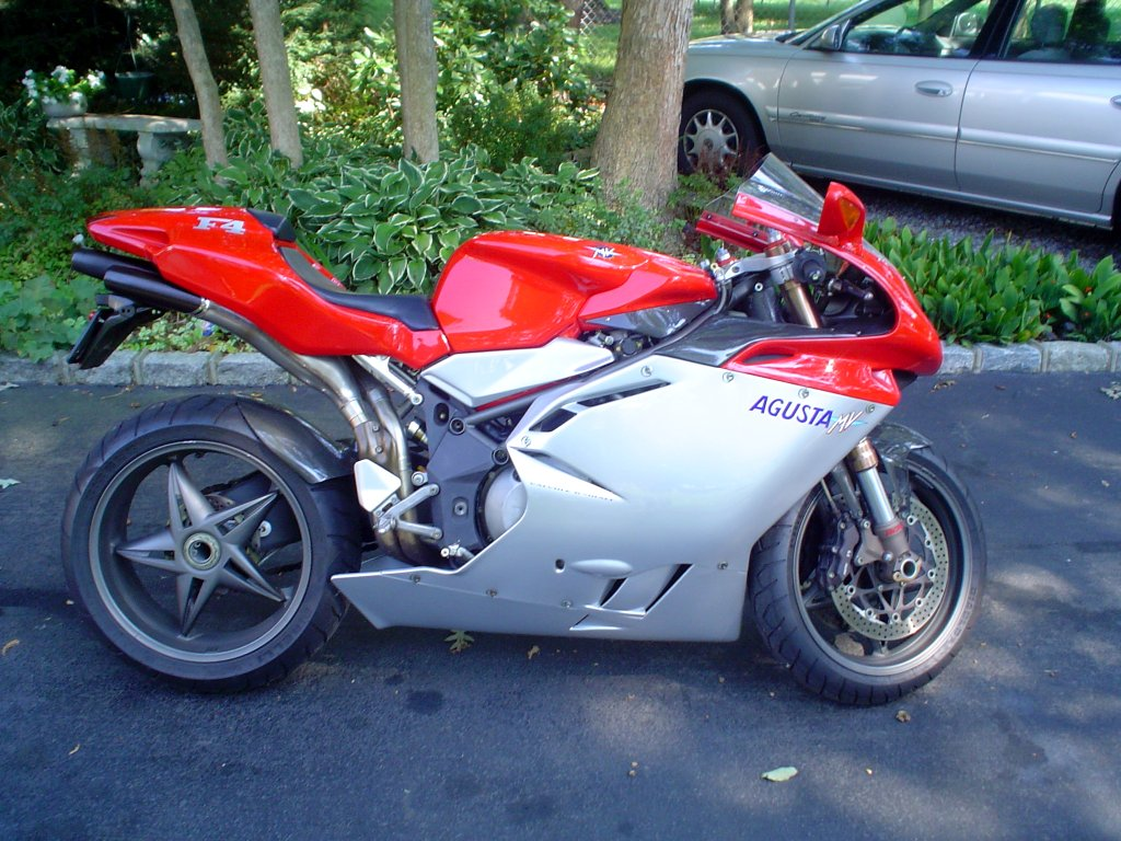 MV Agusta 750 F4S